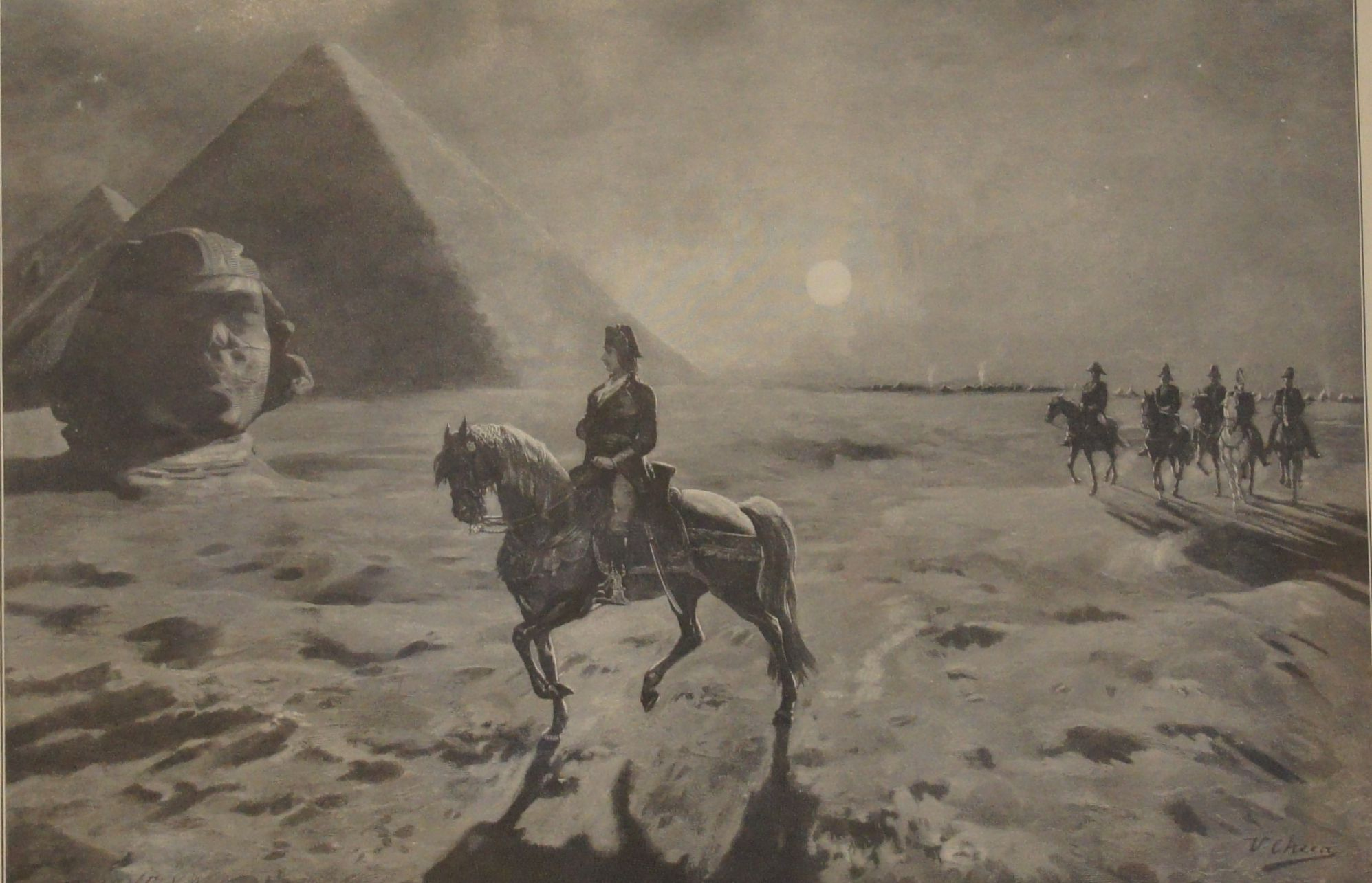 Napoleón en Egipto, fotograbado sobre papel, 26,5 x 37,2 cm., Inscripciones: "U. Checa. Napoleón von der sphinx. Copyright by Fischer, Adler and Schwartz. New York. Vervieldältigung und Einzelverkauf dieses Kunstblatles ist untersagt.